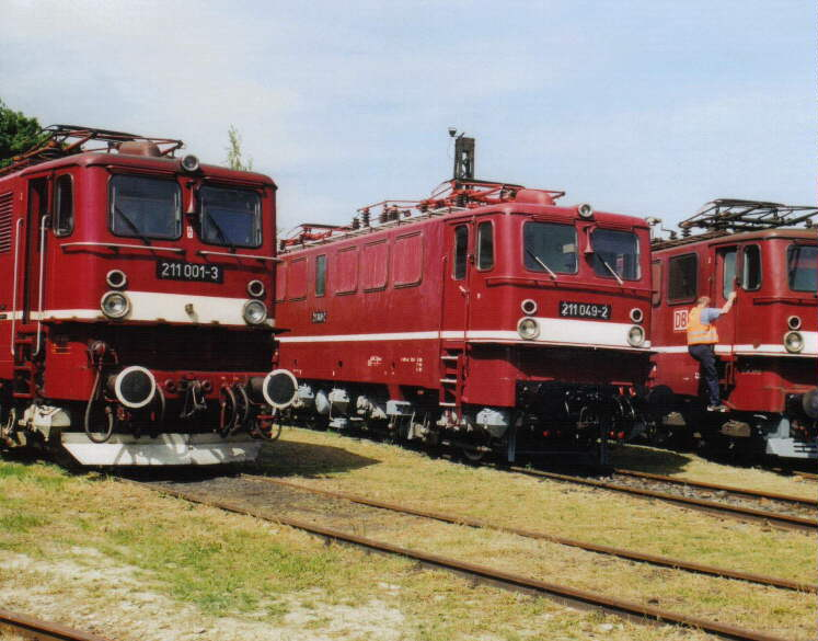 211 001 und 211 049 am 24. Mai 2003 bei einer Ausstellung in Weimar. Aufnahme: Steffen Mokosch